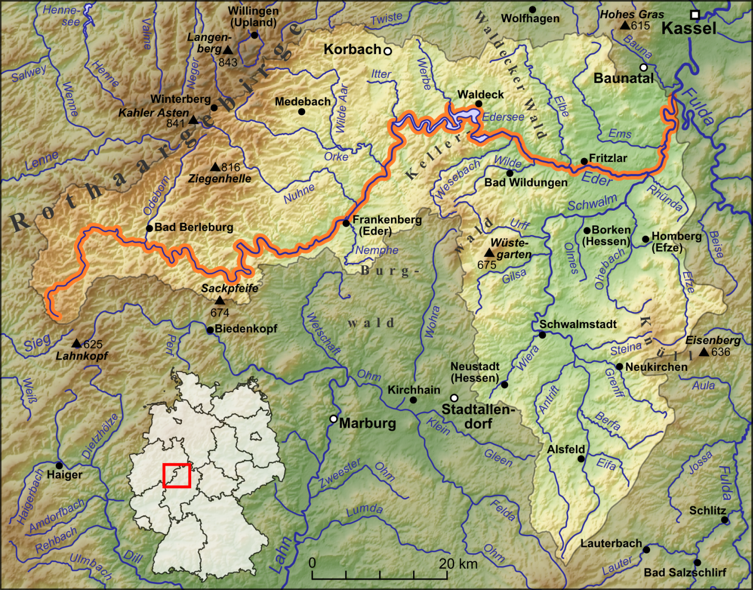 Die Eder, ihre Nebenflüsse und das Wassereinzugsgebiet begrenzt durch die Wasserscheiden